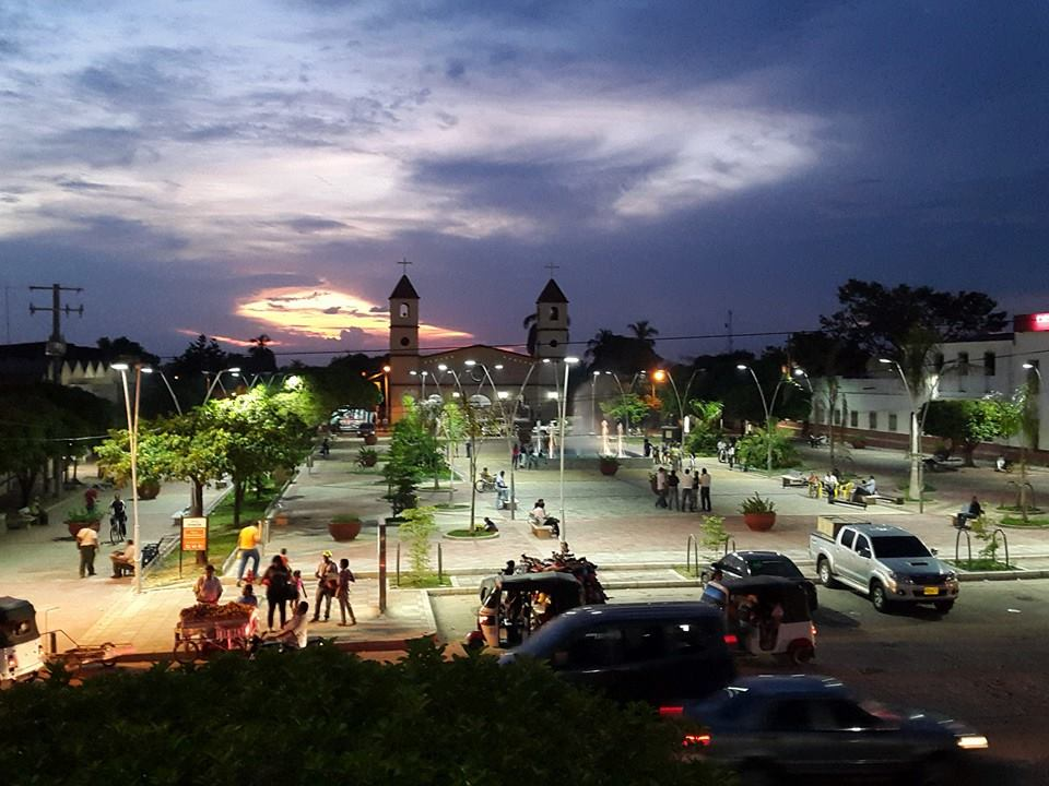 Plaza principal Alfonso àvila.